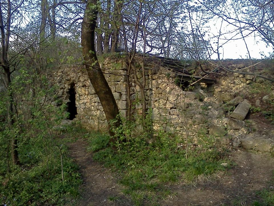 Fundații conac mare 02